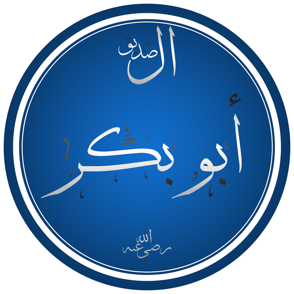 كتابة اسم سيدنا أبو بكر الصديق رضي الله عنه